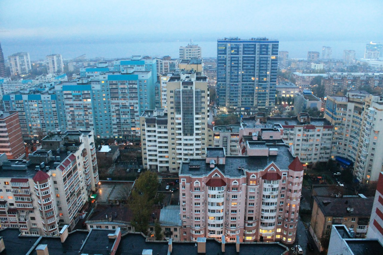 Вид с ЖК "Верхняя Полевая"